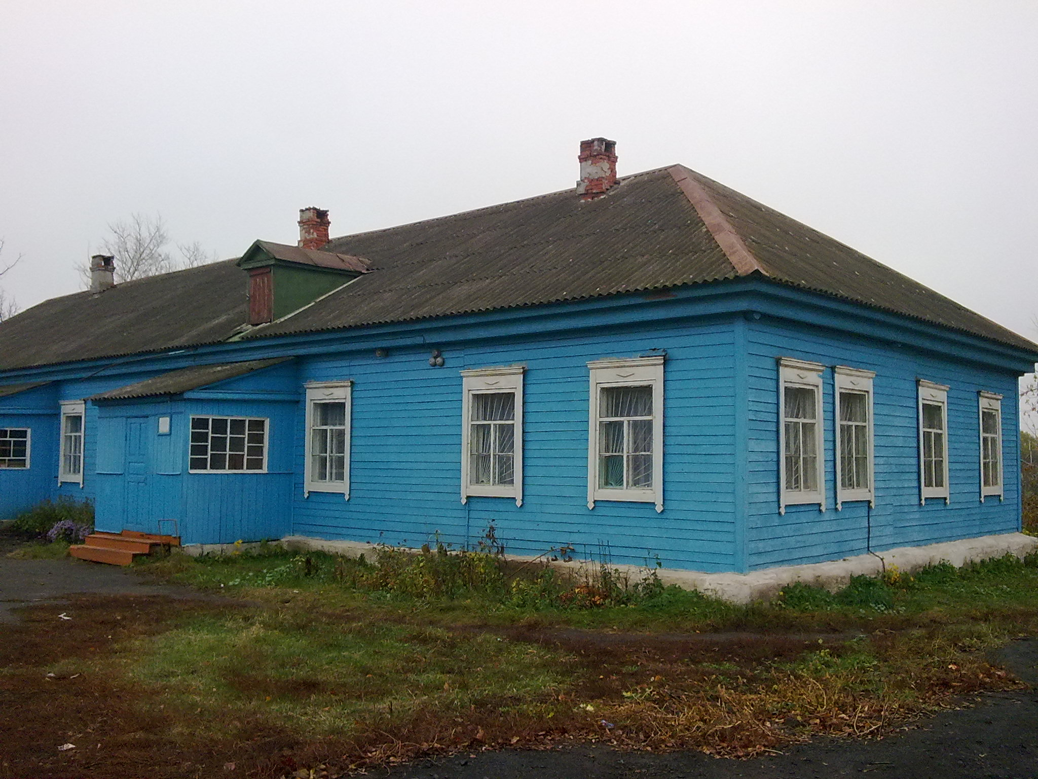 Советская основная общеобразовательная школа Сосновского района Тамбовской области.